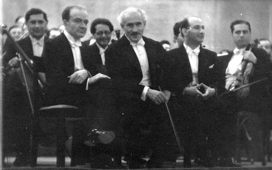 ביקור המנצח טוסקניני (במרכז עם שרביט המנצח) בתל אביב 1936 להזמנת הכנר ברניסלב הוברמן לנצח על קונצרט הפתיחה של הפילהרמונית הישראלית - קטה-דן